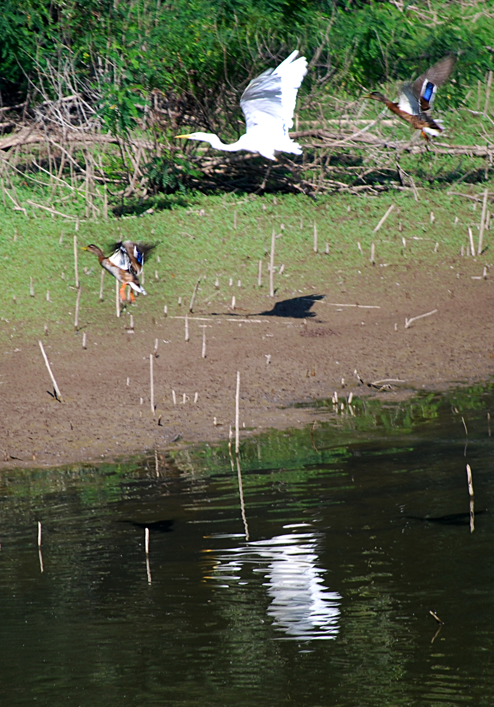 Le Bine This is a photo of a monument which is part of cultural heritage of Italy. The authorisation for taking photos of this object was provided by the World Wide Fund for Nature Italy.